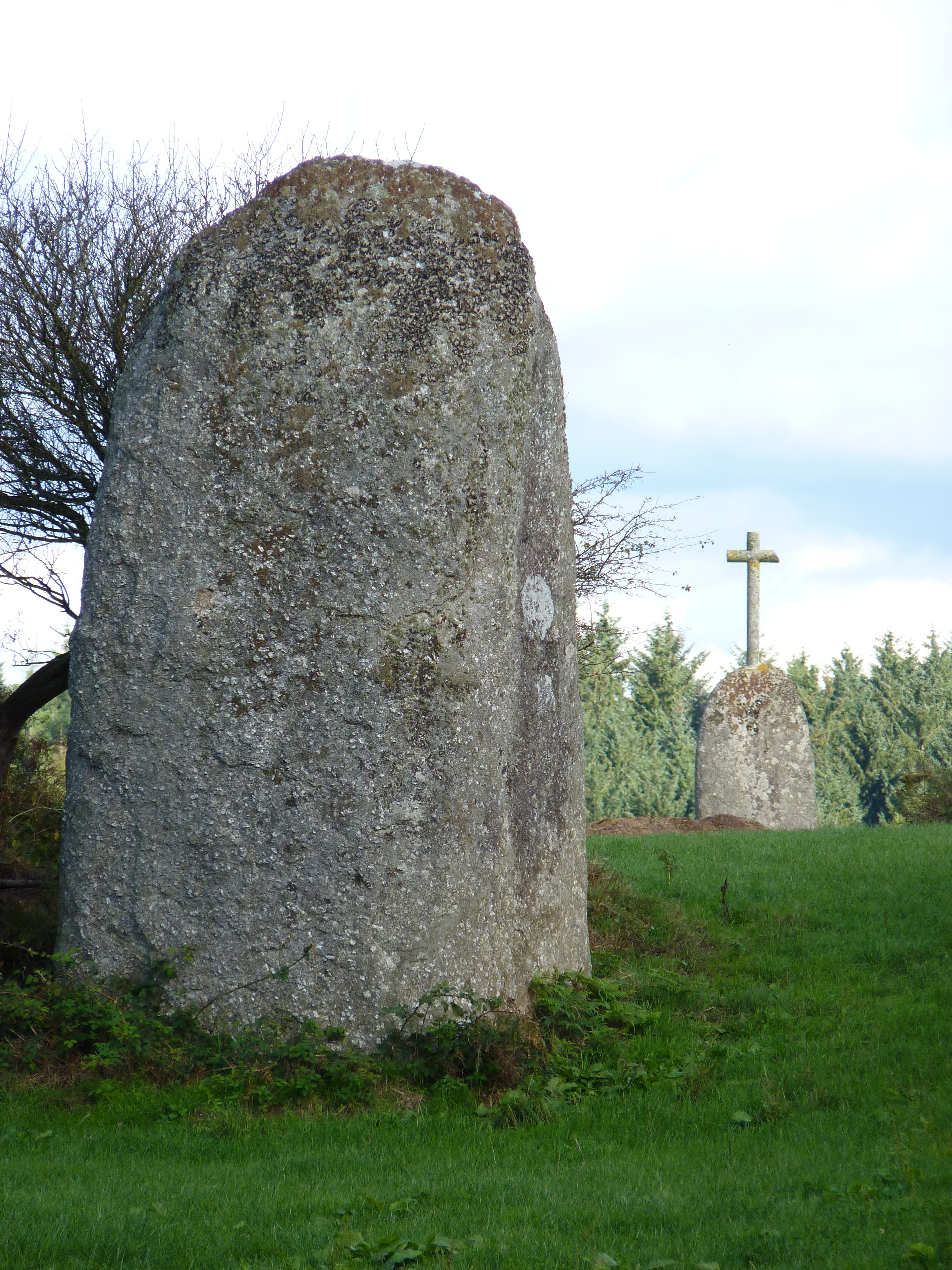 Menhir situé à proximité du menhir christianisé dit croix de Pasquiou.